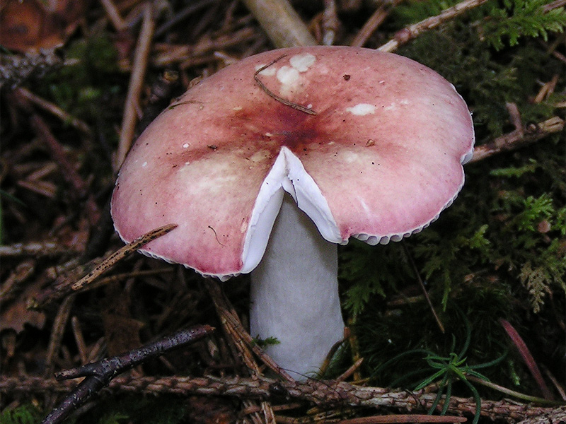 Russula betularum - Russulaceae